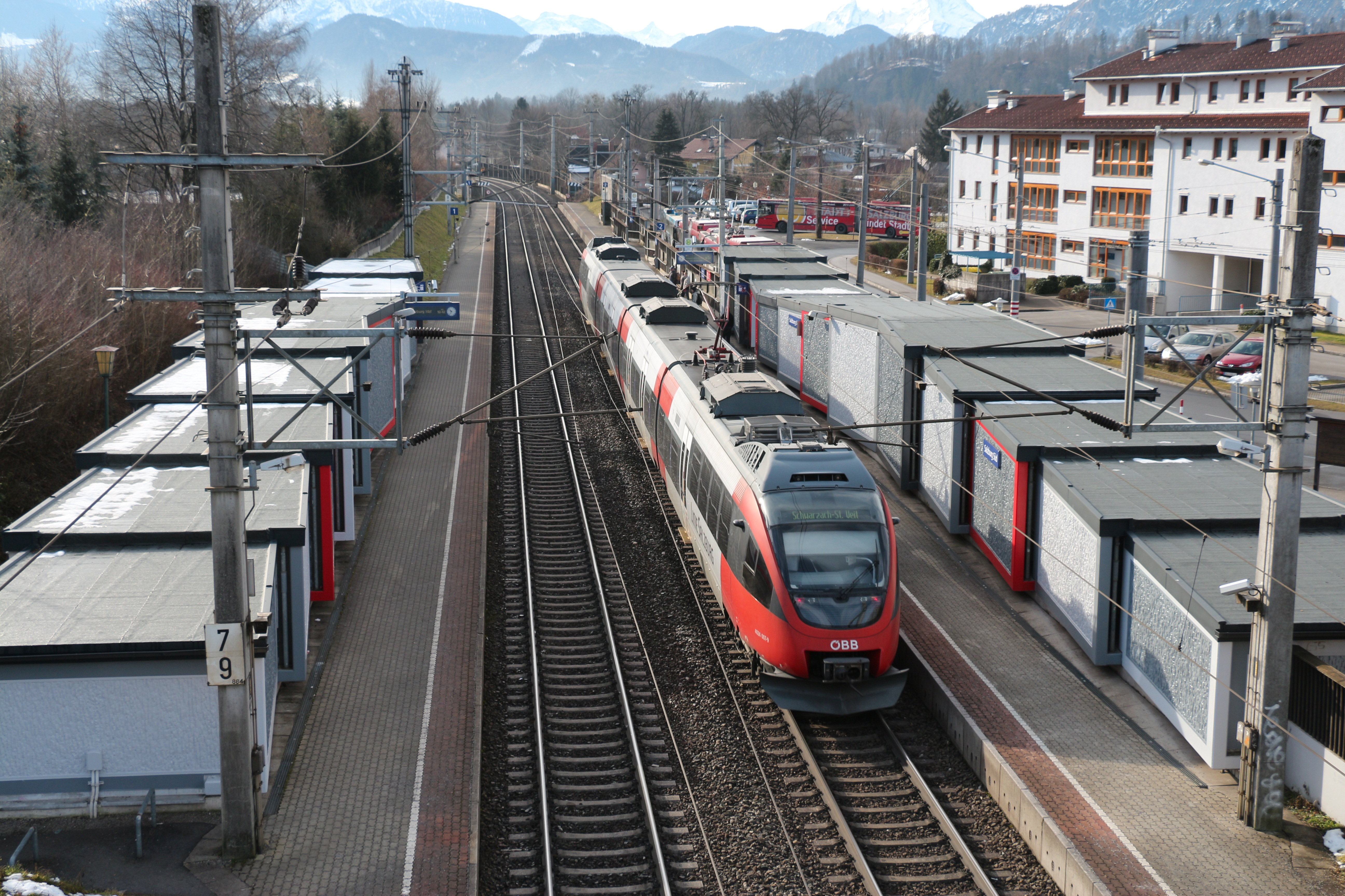 S-Bahn-Haltestelle Salzburg Süd, Ansicht Richtung Süden